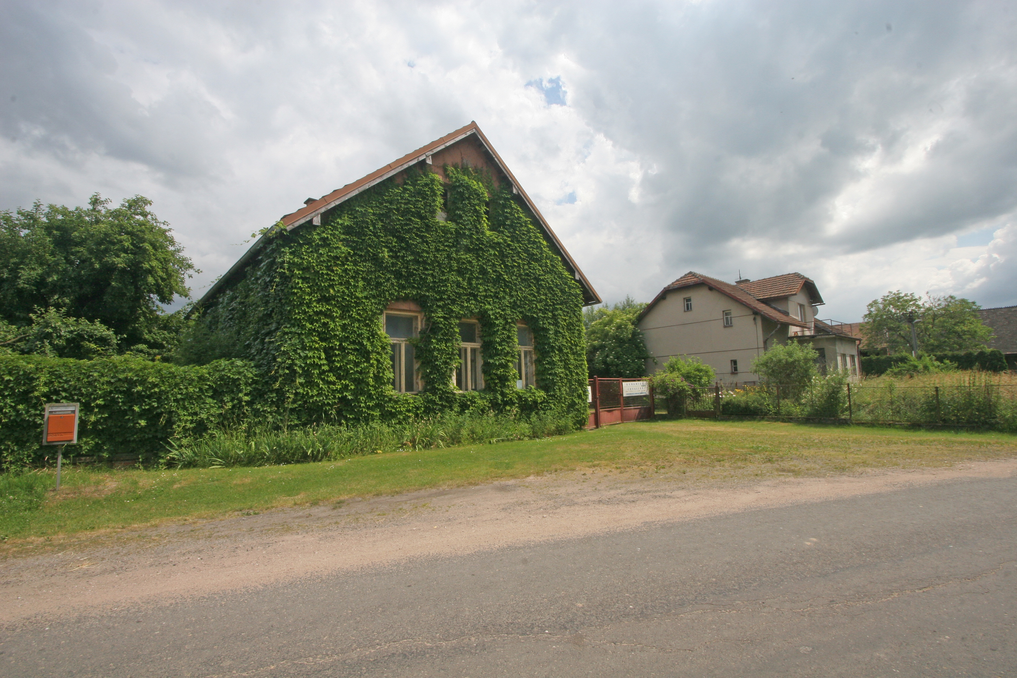 Chvalina č.p. 11